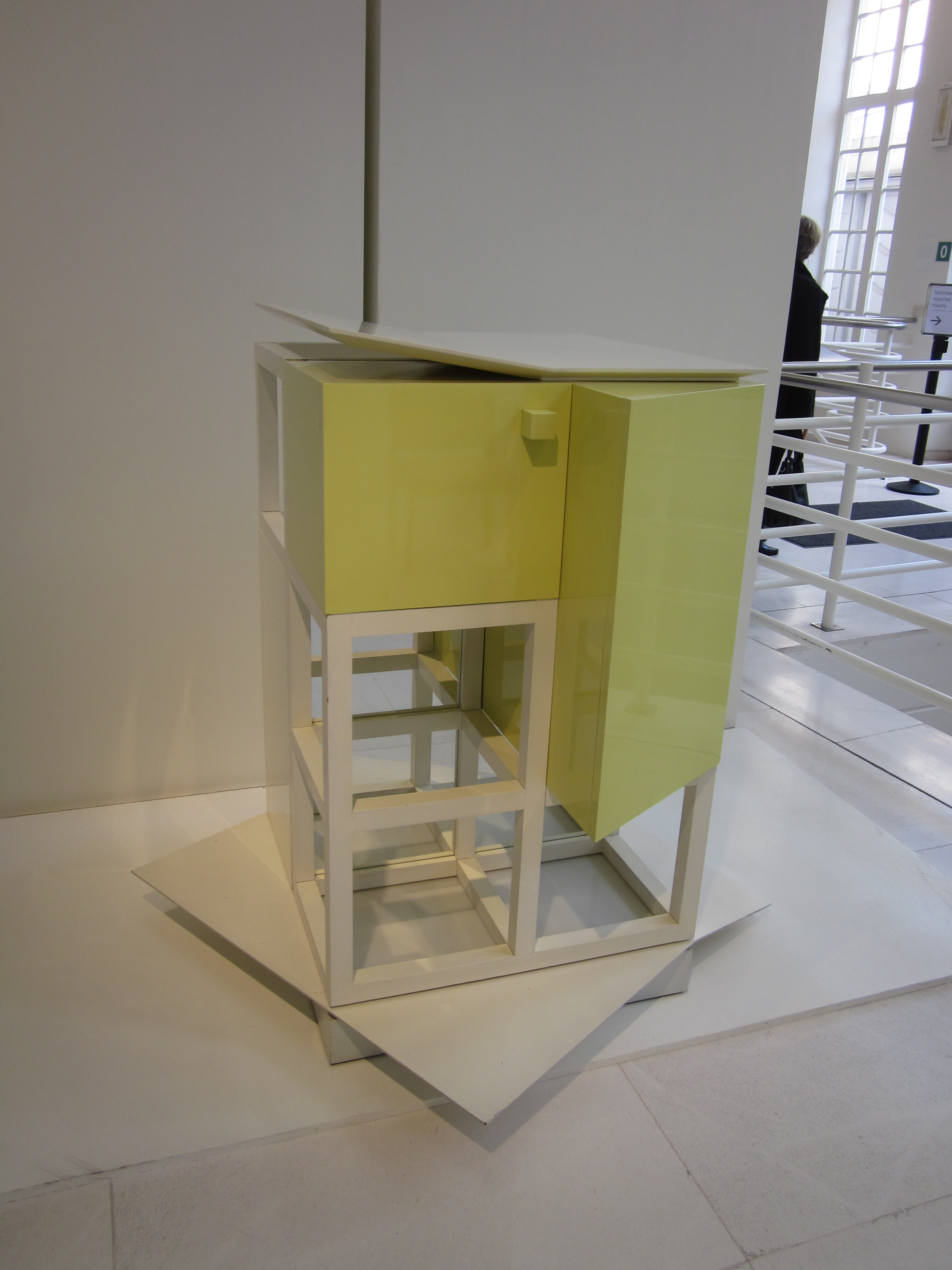 Huldeblijk aan Giò Ponti 1979 Tentoonstelling "Pieter De Bruyne Pionier van het postmoderne" Design Museum Gent 2012